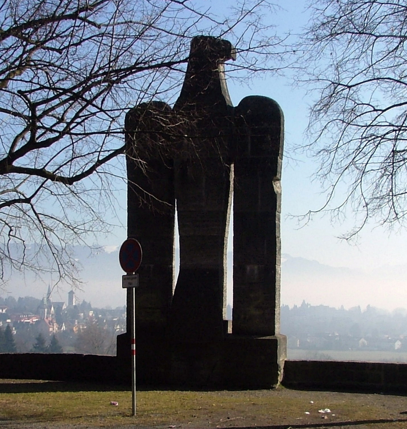 Bismarck-Denkmal auf dem Hoyerberg bei Lindau, Bayern